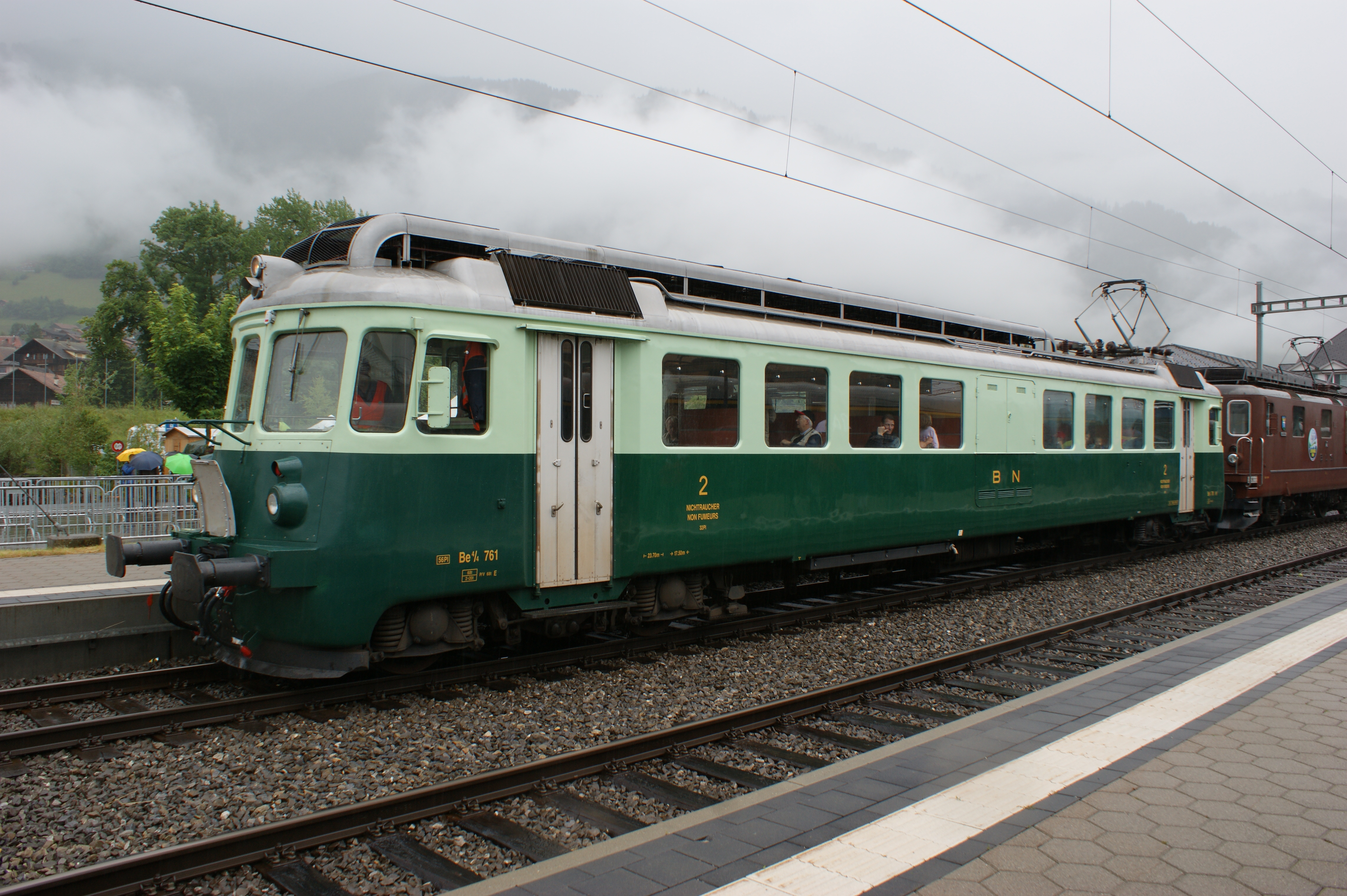 «Wellensittich» Be 4/4 761 der BLS in Frutigen, anlässlich des Nordrampenfestes 100 Jahre Lötschbergbahn. Der Triebwagen ist mit der TSI-Nr. 94 85 7545 761-9 im NVR eingetragen.